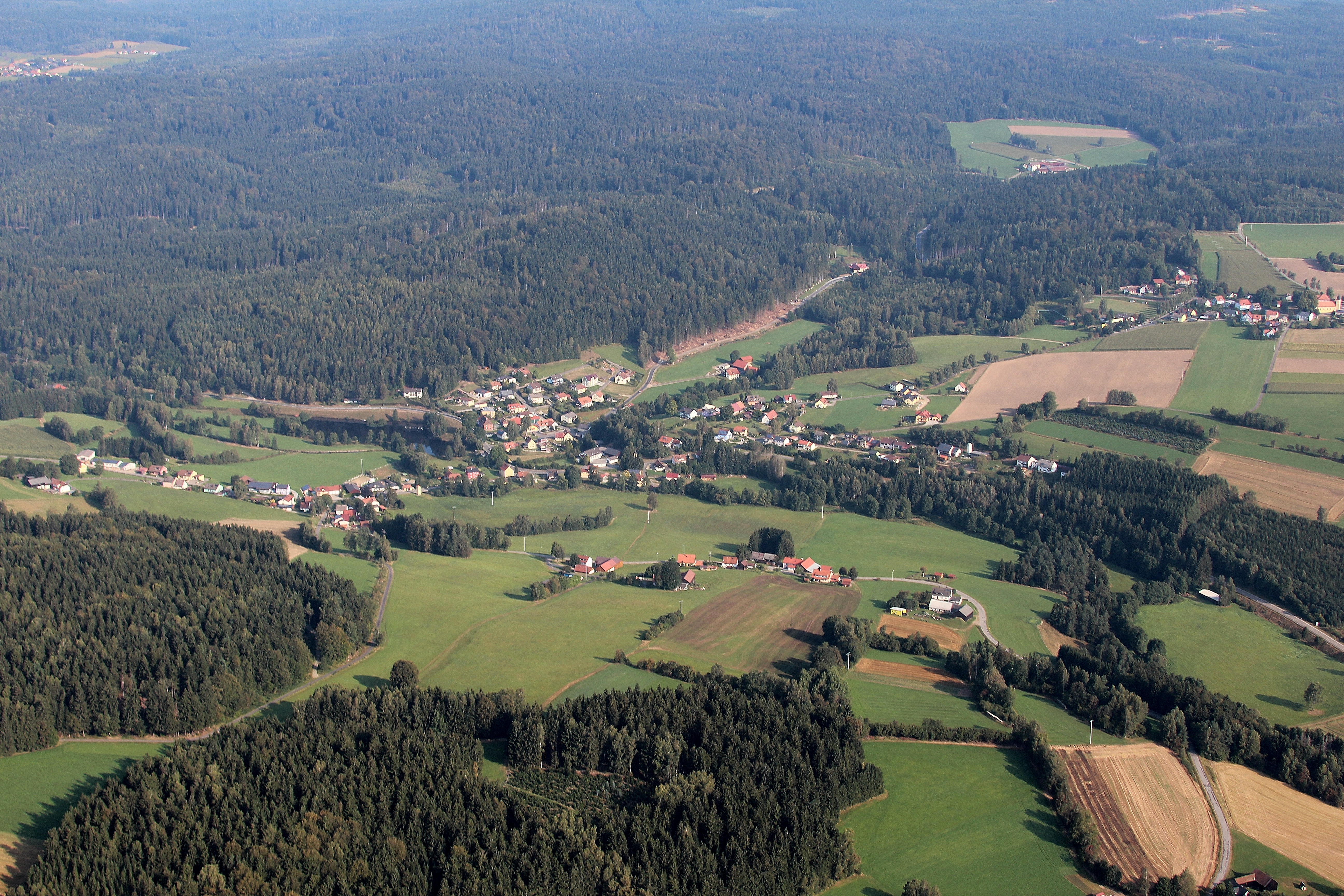 Georgenberg (Bildmitte) mit Zottbach, Faislbach (linker Bildrand), Neukirchen zu St. Christoph (rechter Bildrand oben); Landkreis Neustadt an der Waldnaab, Oberpfalz, Bayern